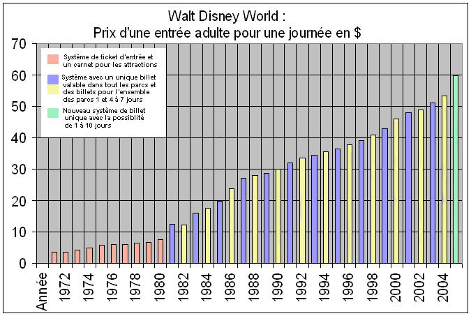 Tableau d'évolution des tarifs du Walt Disney World. sources données pour les tarifs : Notes: avant 1978 le billet ne permettait que l'accès au parc et des carnets de tickets étaient en vente pour accèder aux attractions.